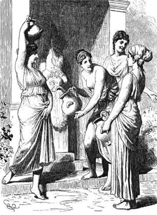 Disegno raffigurante donne dell'antica Grecia